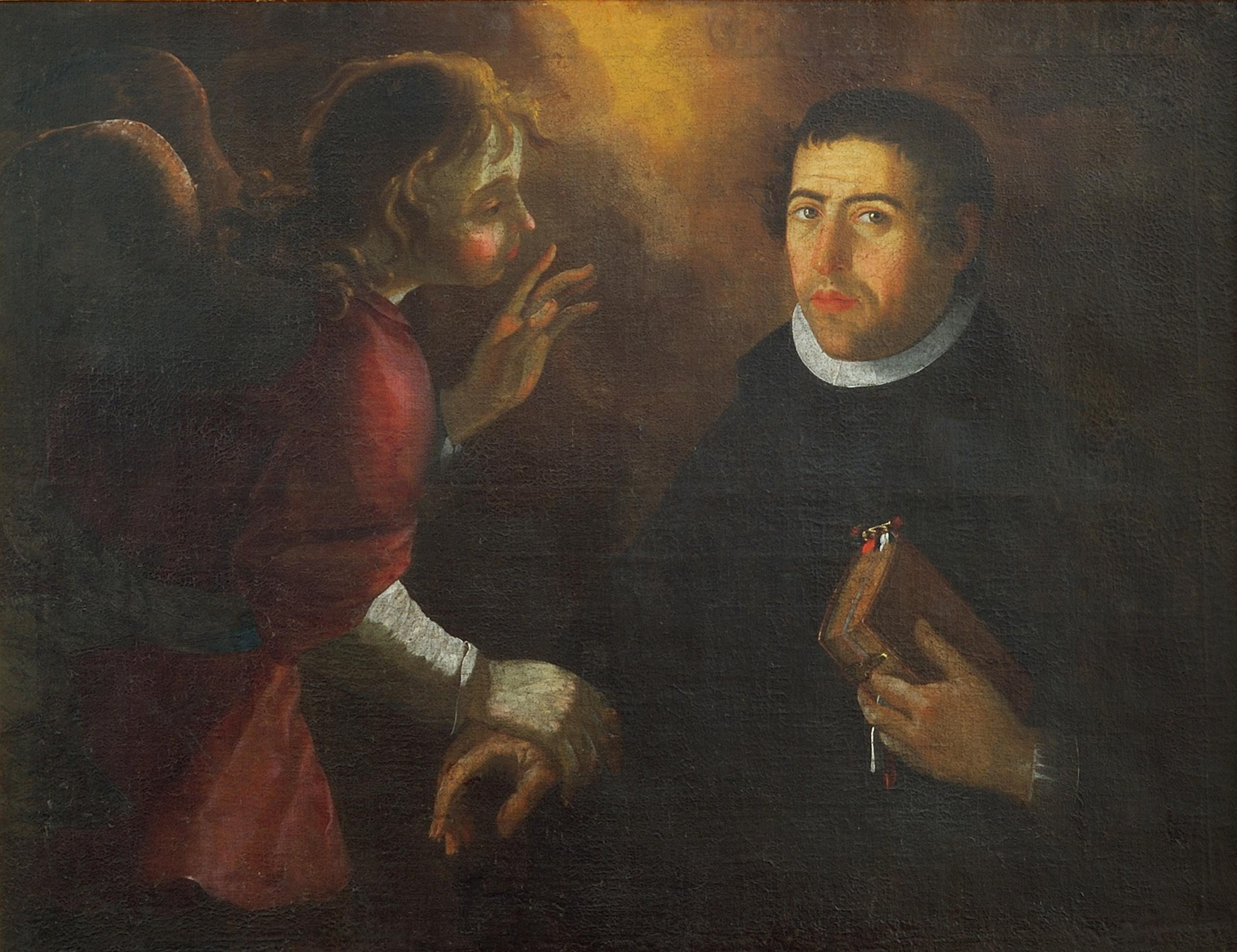 Retrato do Beneficiário Faustino das Neves de Josefa de Óbidos no Museu Municipal de Óbidos.